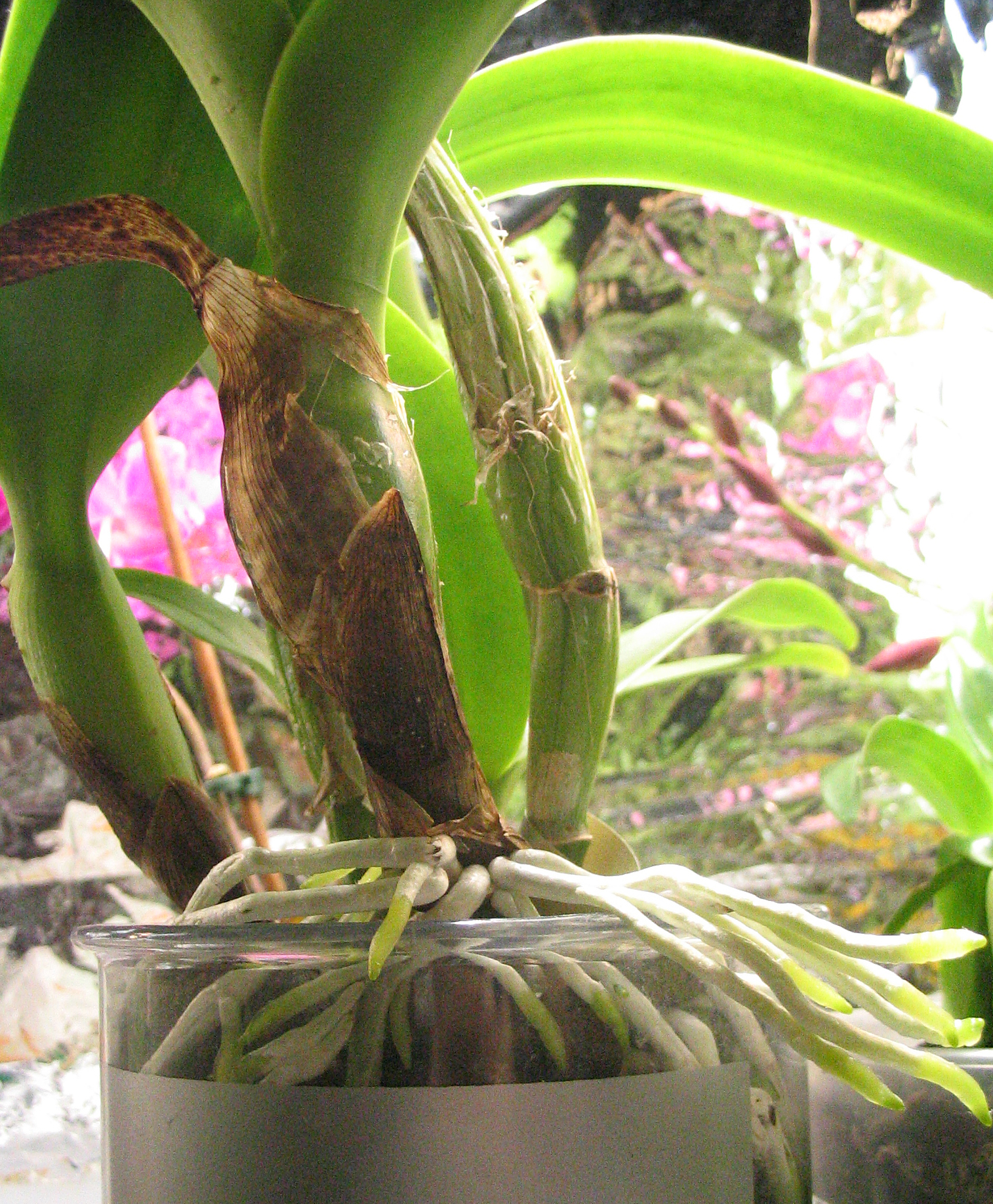 Föreställer cattleya 6 veckor efter transplantering från konventionell odling till semi-hydro kultur. Rikligt med nya yt-rötter.